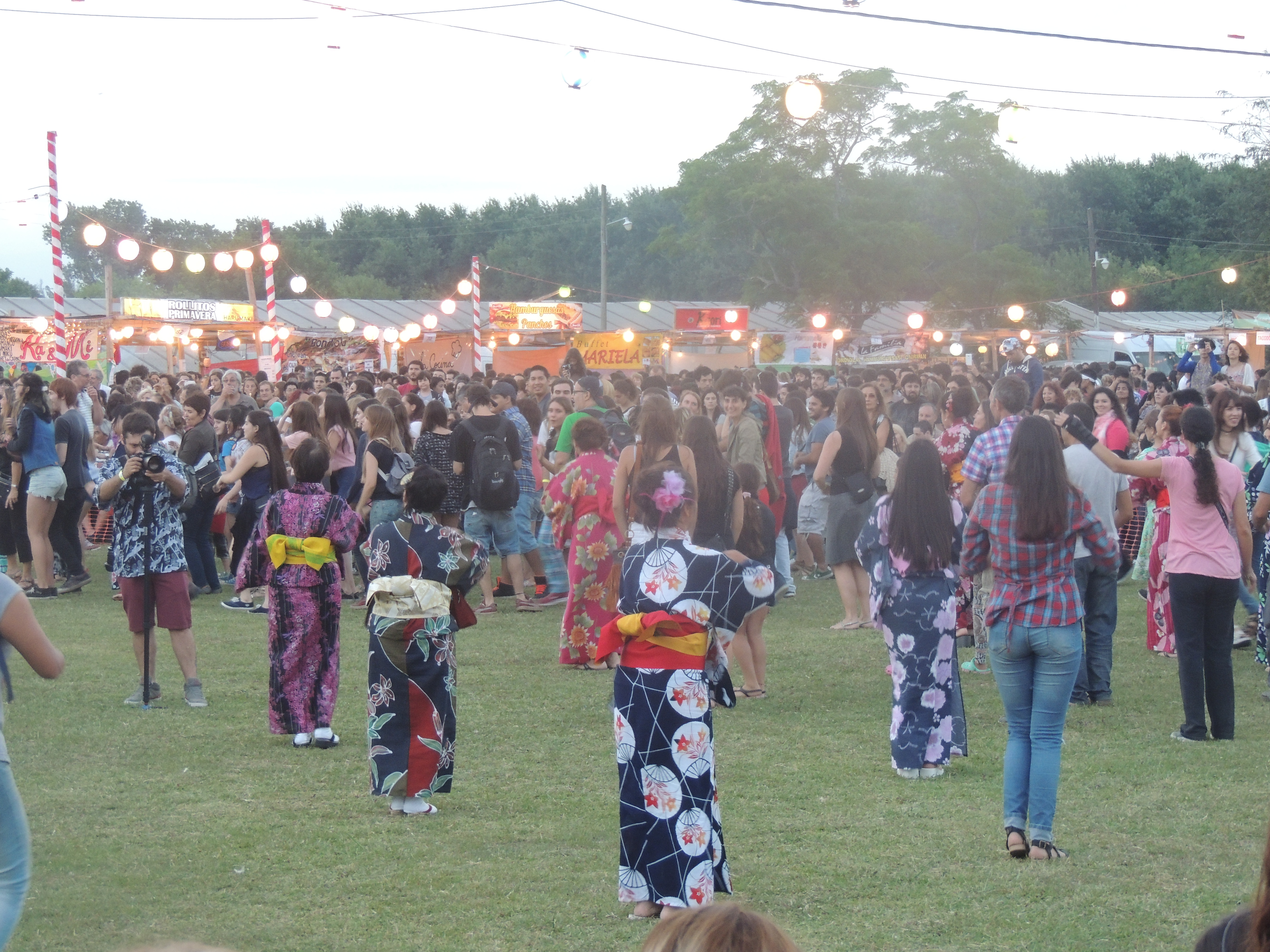 Festival Bon Odori en Colonia Urquiza, Partido de La Plata, Buenos Aires, Argentina